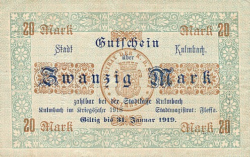 Notgeld z Kulmbach 20 marek z 1918